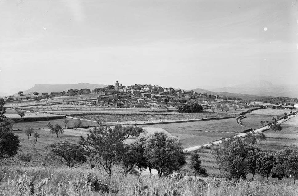 Imatge